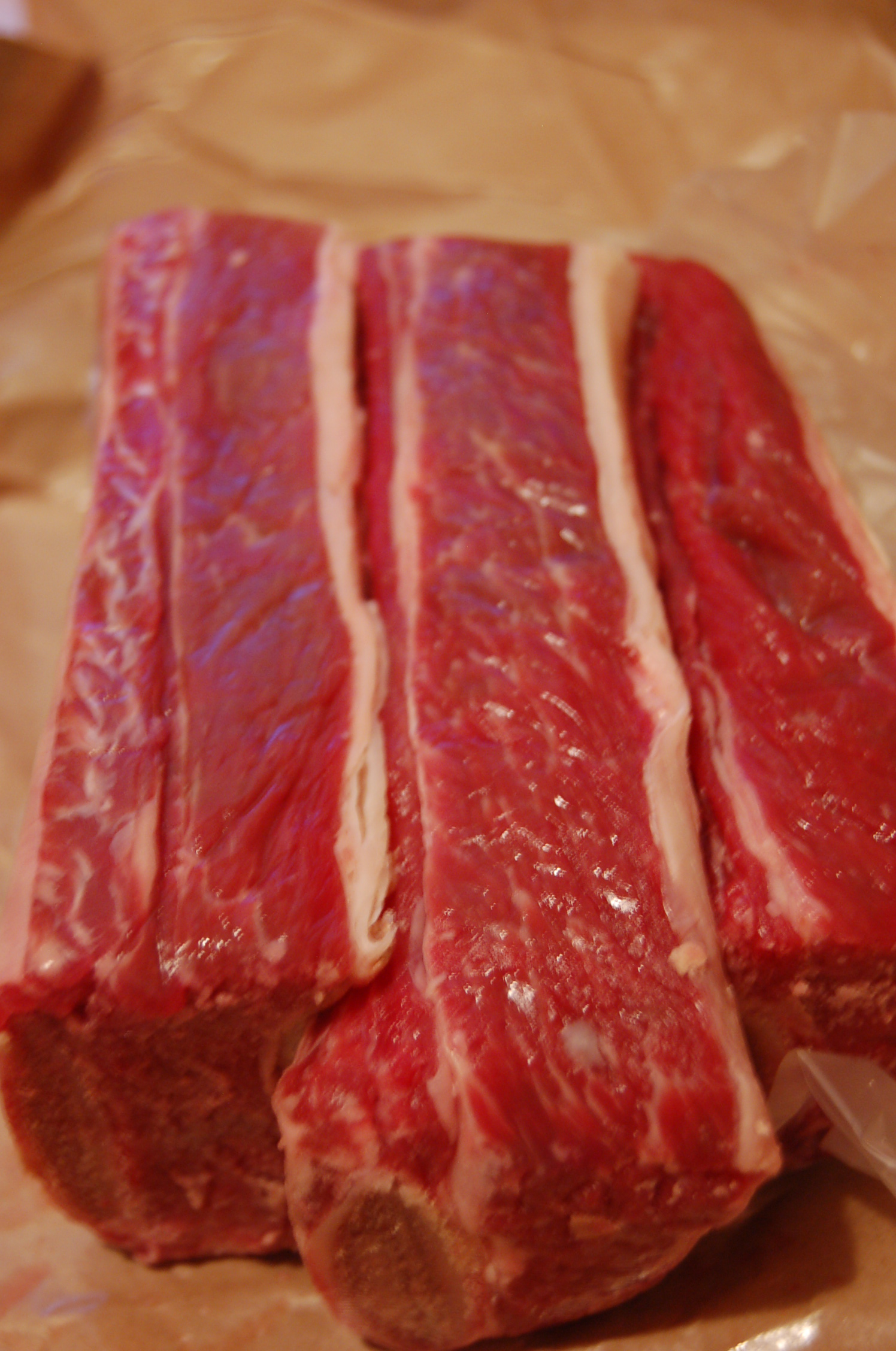 Morceaux pour bœuf bourguignon